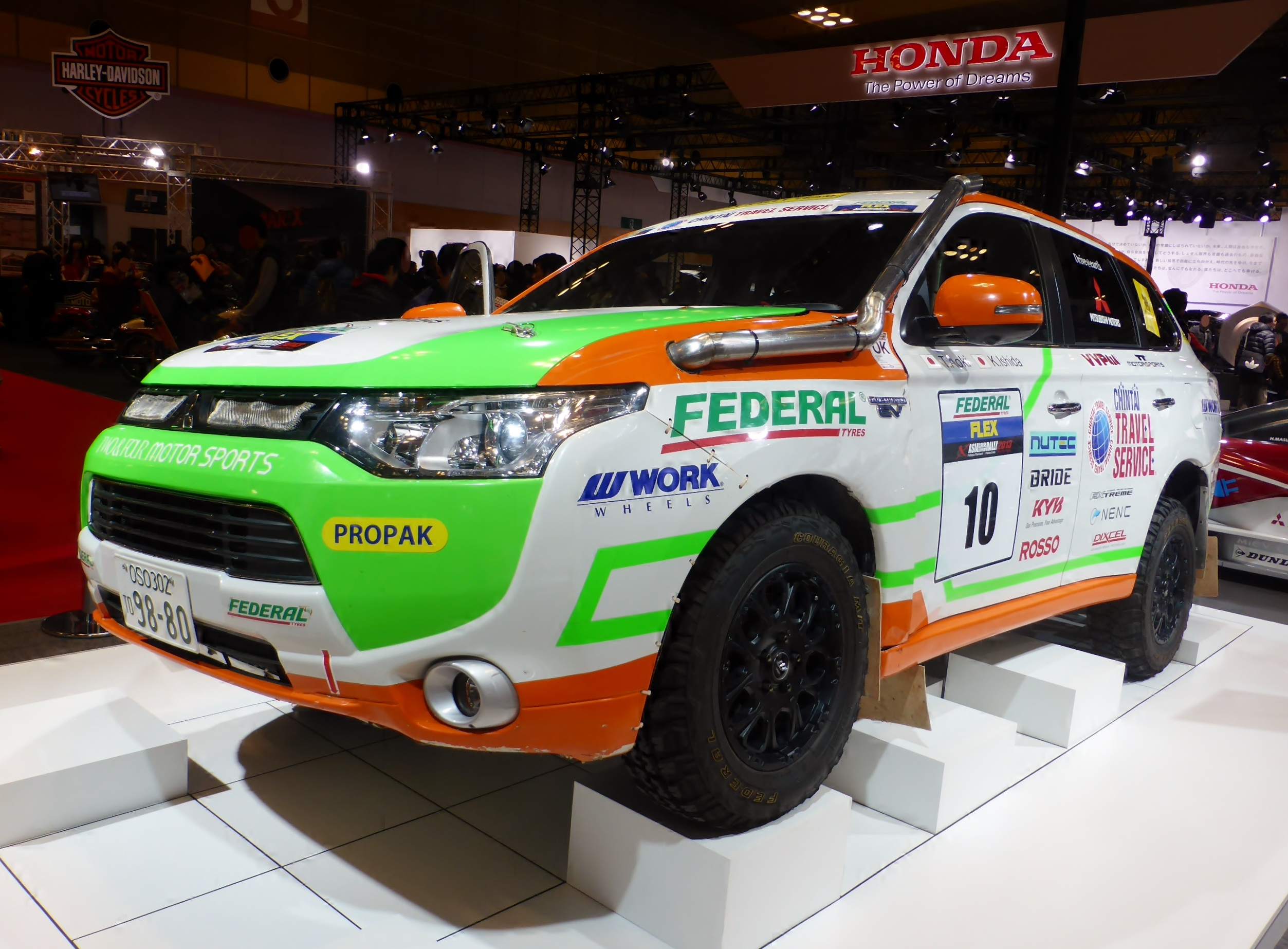 大阪モーターショー2013の三菱ブースにおいてTWO and FOUR OUTLANDER PHEVを撮影。